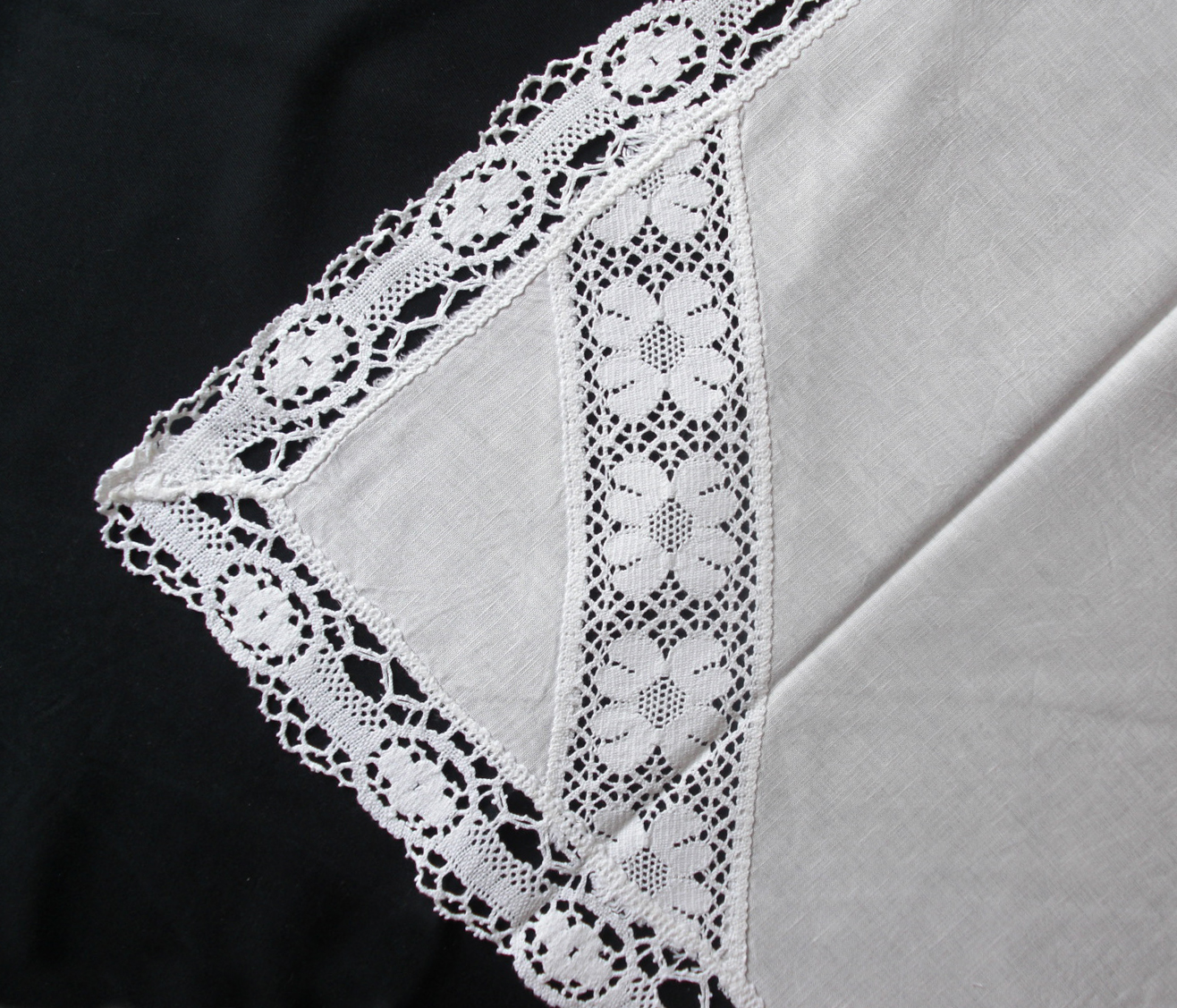 Maschinengeklöppelte Spitze aus Wuppertal-Langerfeld